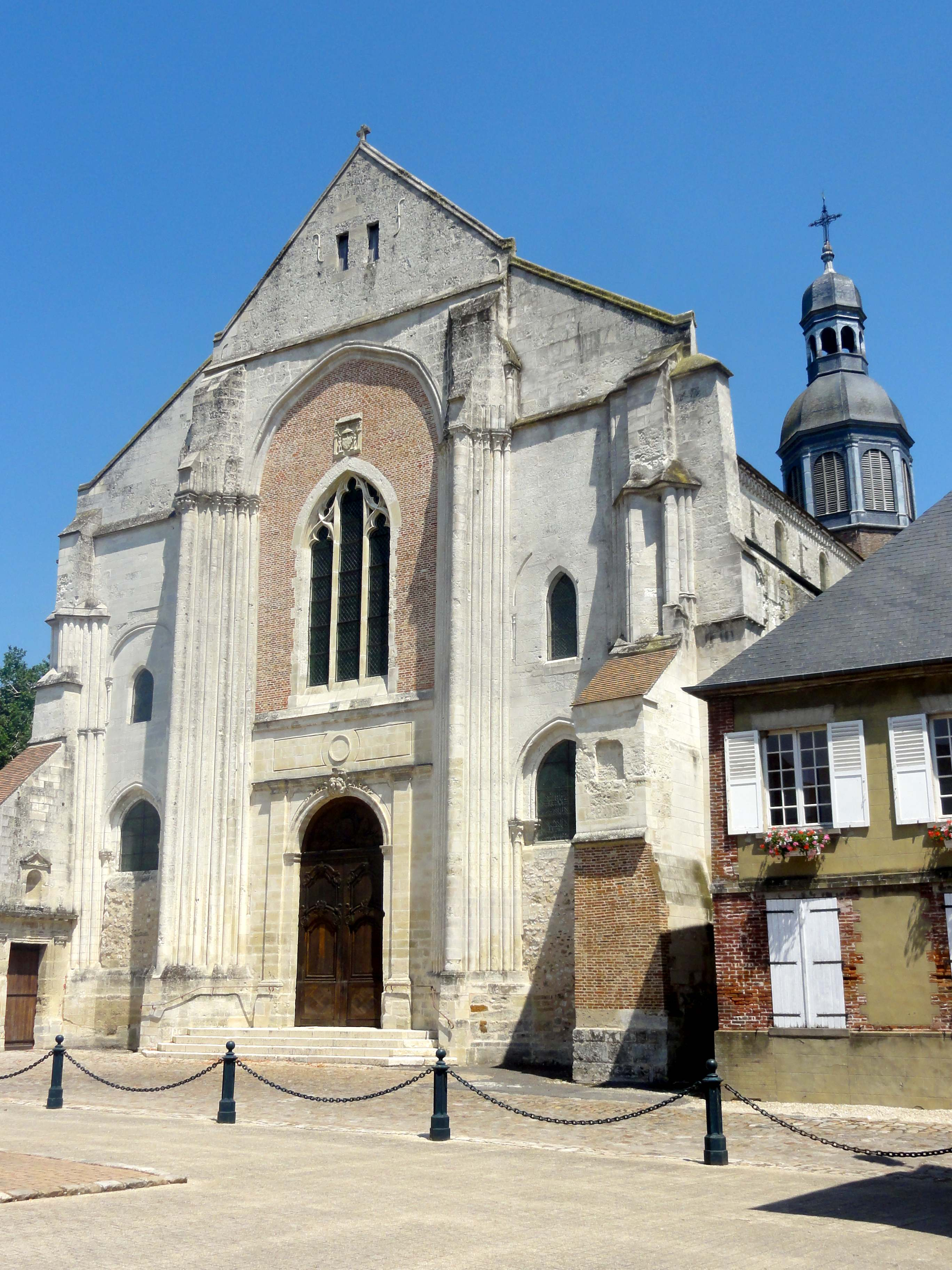 Église abbatiale Saint-Germer de l'ancienne abbaye Saint-Germer-de-Fly - voir le titre du fichier.